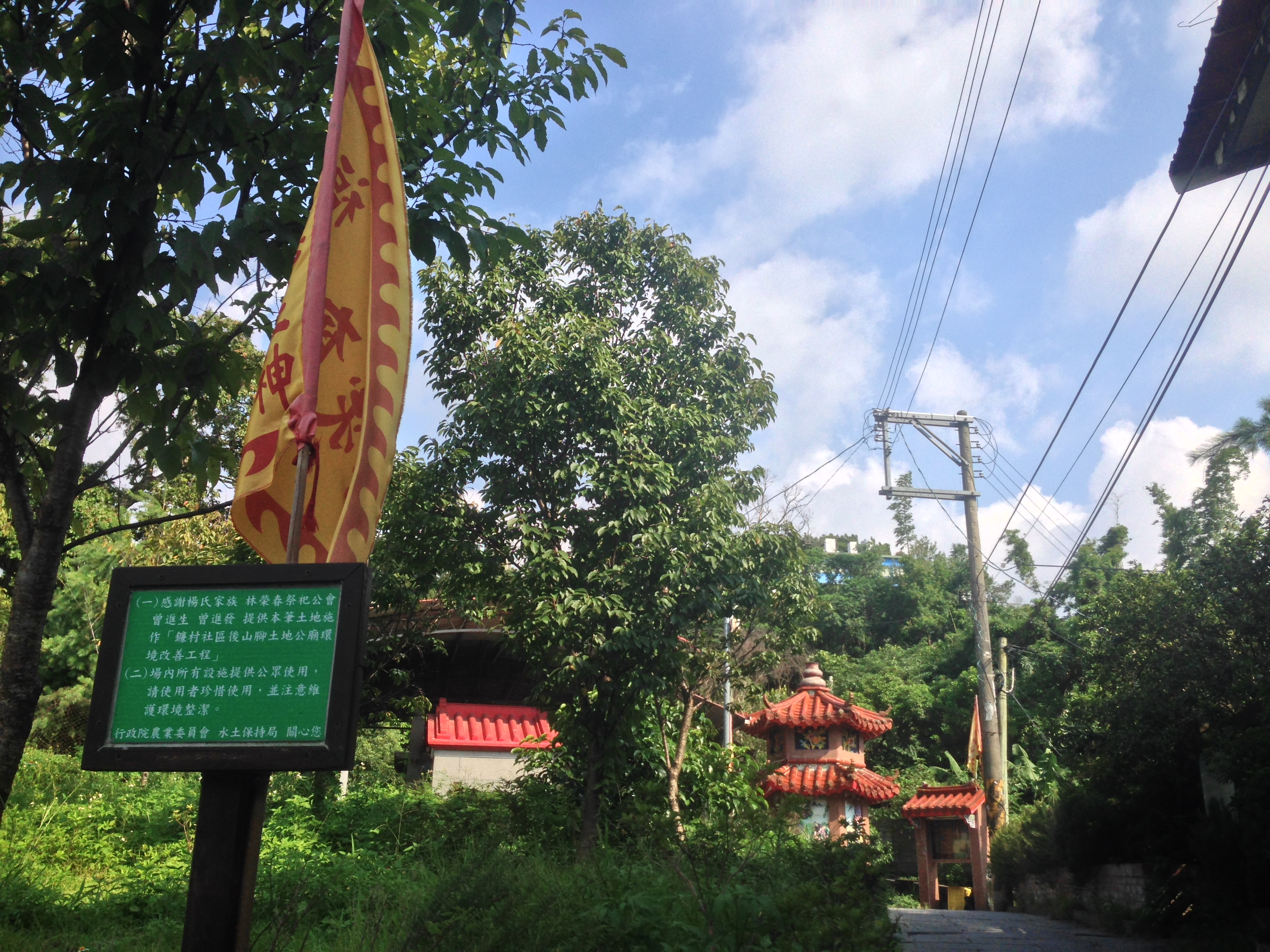 中文（台灣）: 後山腳福德祠化胎